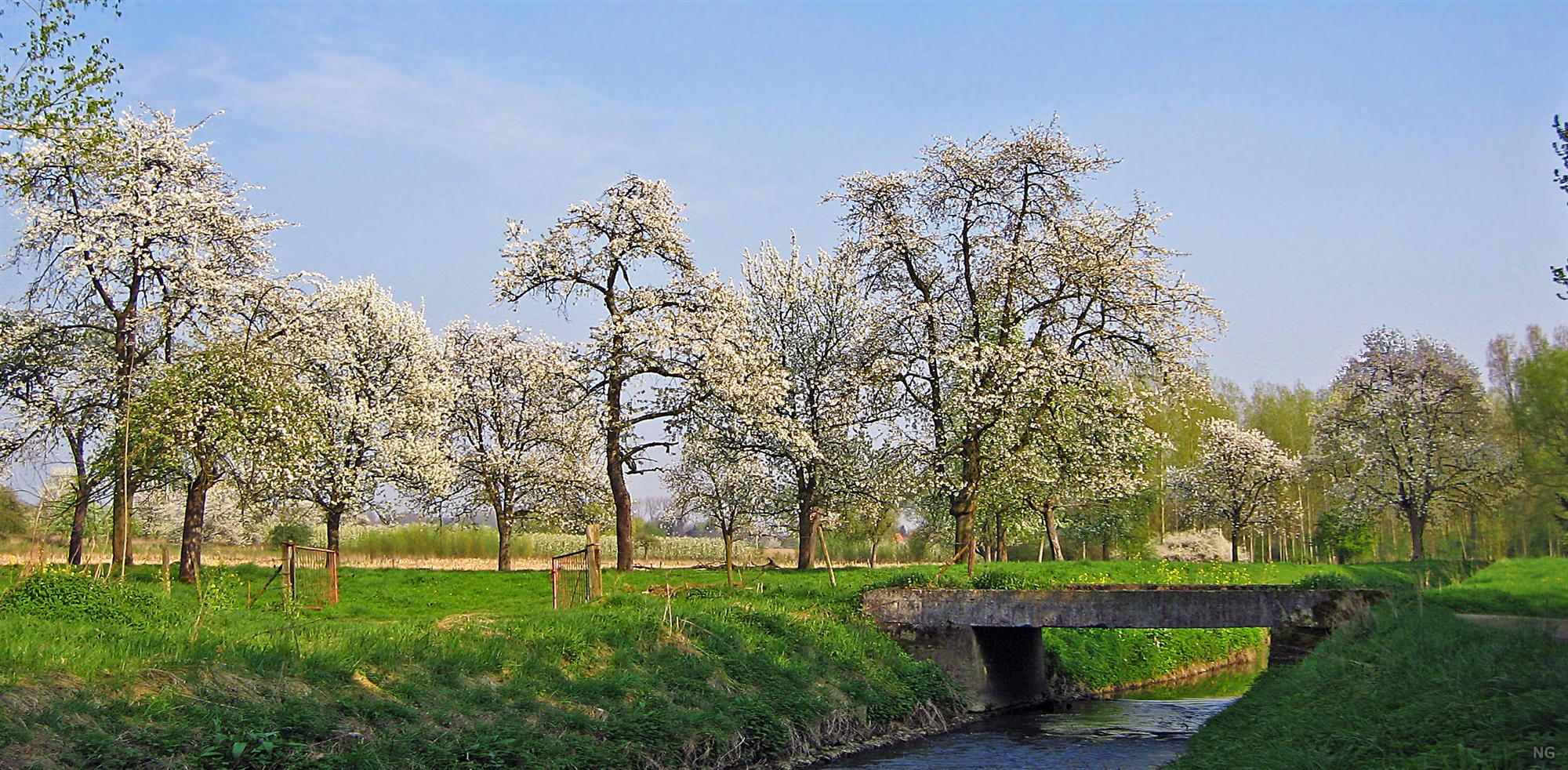 Alken tijdens de bloesemperiode (lente 2011) - Met het riviertje de Herk en hoogstamfruitbomen in bloei.